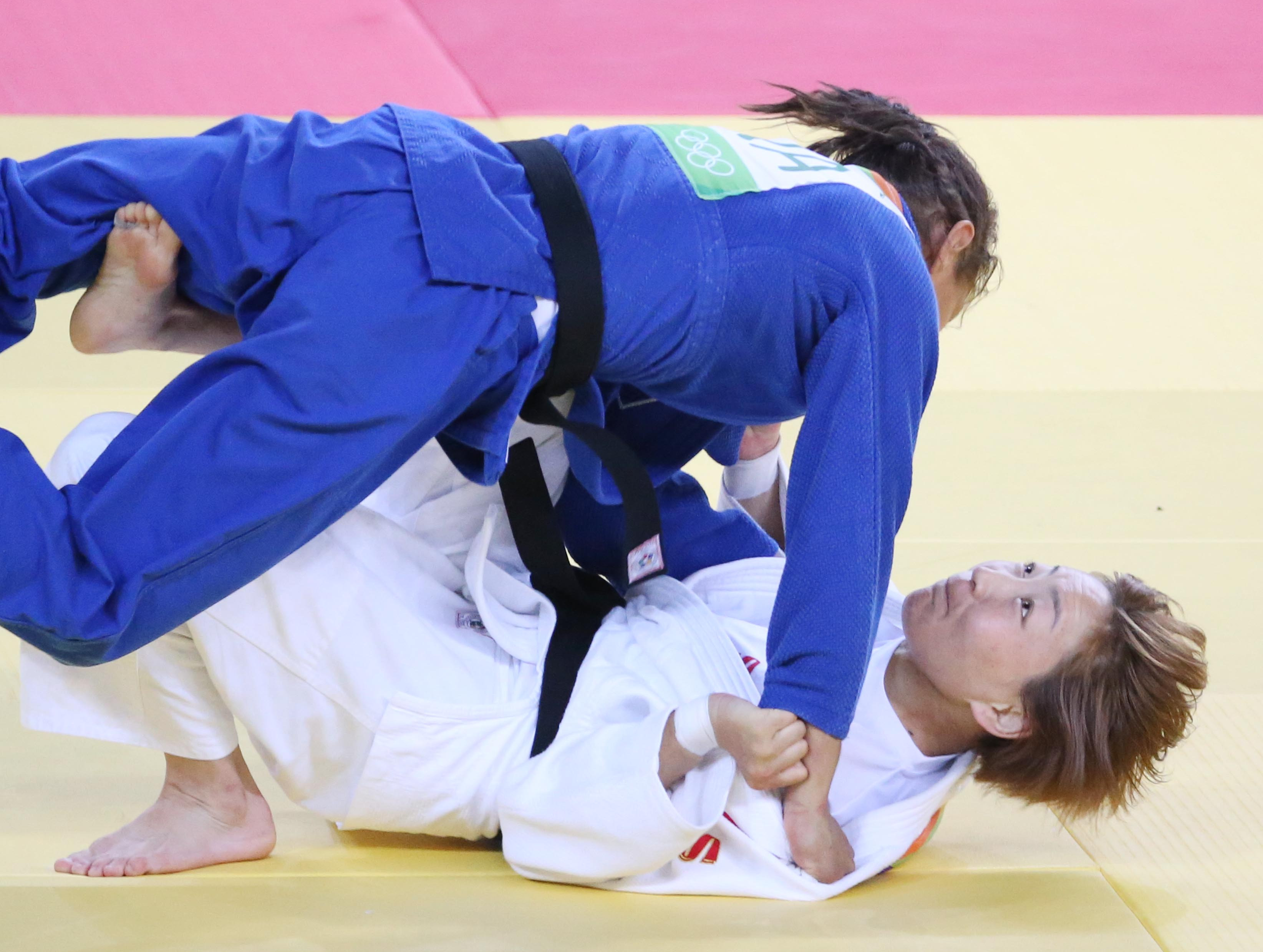 06 de Agosto de 2016 - Rio 2016 -Judô- Sarah Meneses perde a repescagem para atleta da Mongólia Munhkbat. - .Foto: Roberto Castro/ Brasil2016